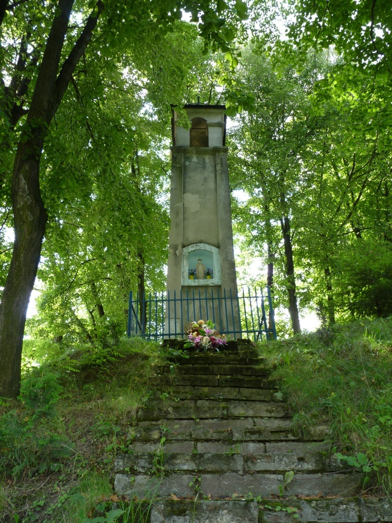 Biała Figura w Gorajcu Starej Wsi, lubelskie, Polska